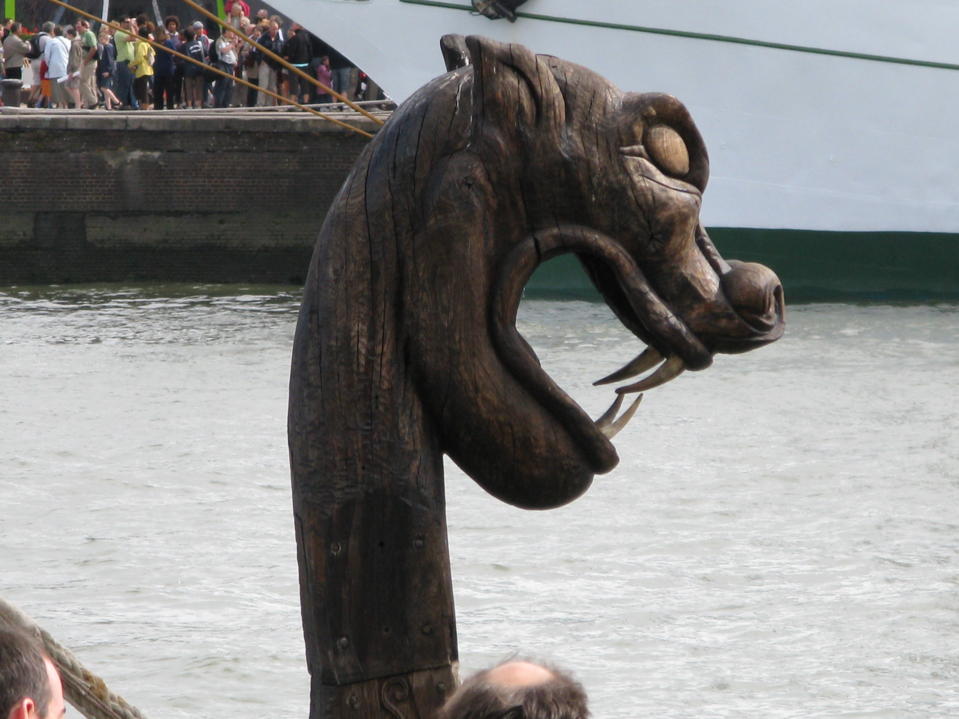 Figure de proue du Dreknor à l'Armada de Rouen 2008 Type : Drakkar, réplique d'un navire ayant servi de sépulture à chef viking en 850, retrouvé dans un tumulus norvégien en 1980 Longueur hors tout : 23,90 m Année de lancement : 2008 Port d'attache : Cherbourg, France